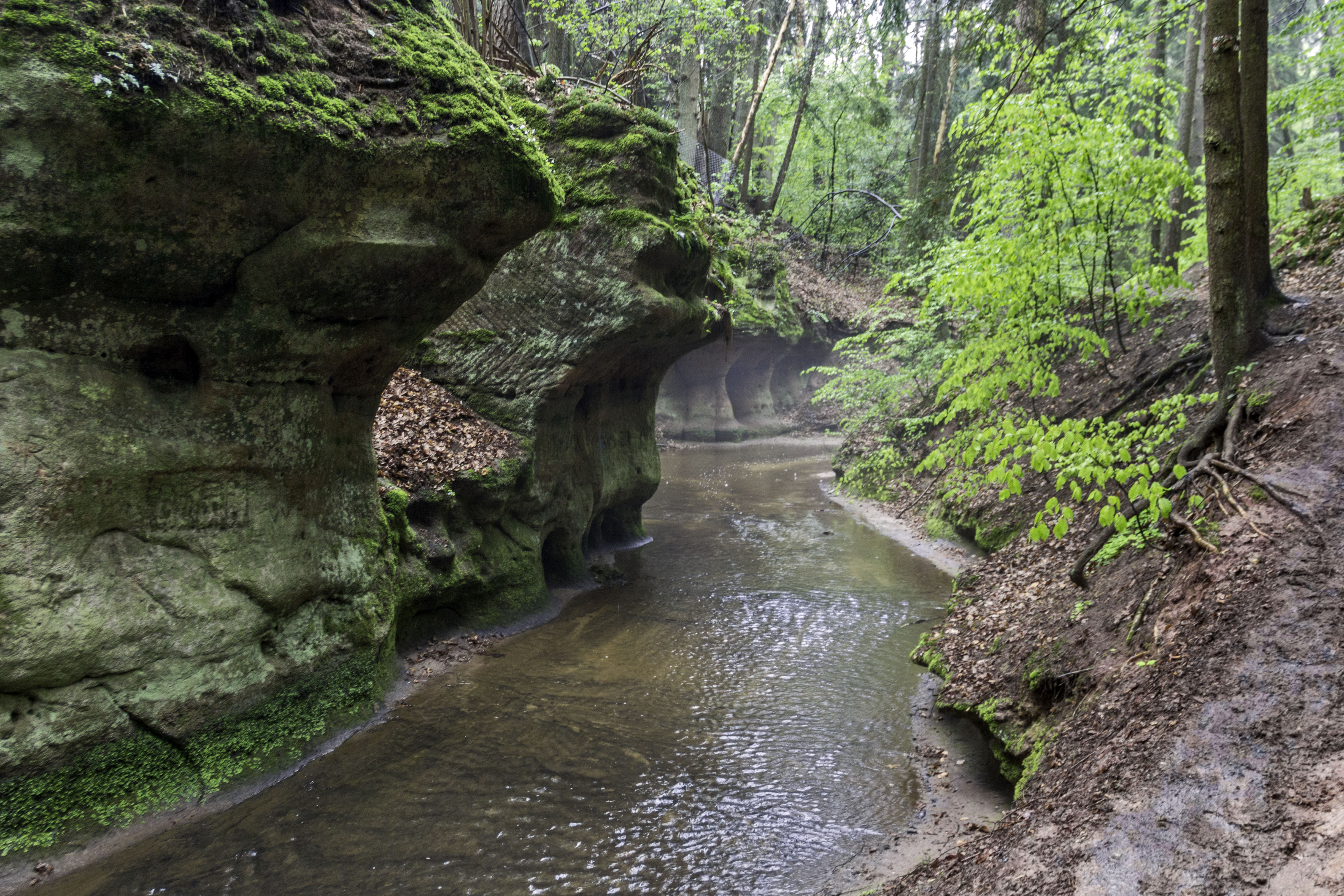 Bitterbachschlucht, Lauf, Nürnberger Land, Geschützter Landschaftsbestandsteil